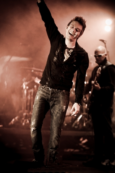 Foto Tirada Durante o Sertanejo Pop Festival.